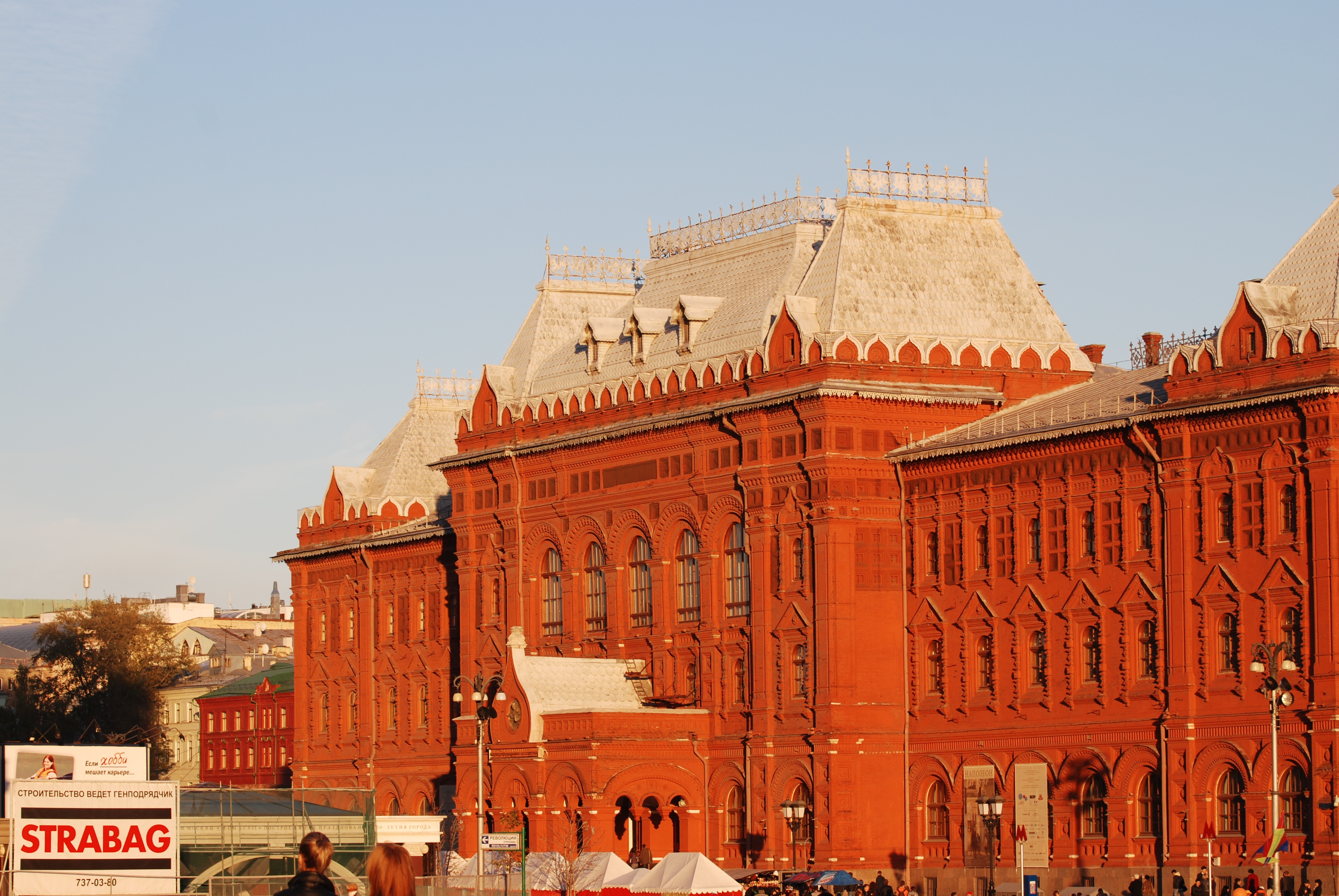 Музей Ленина